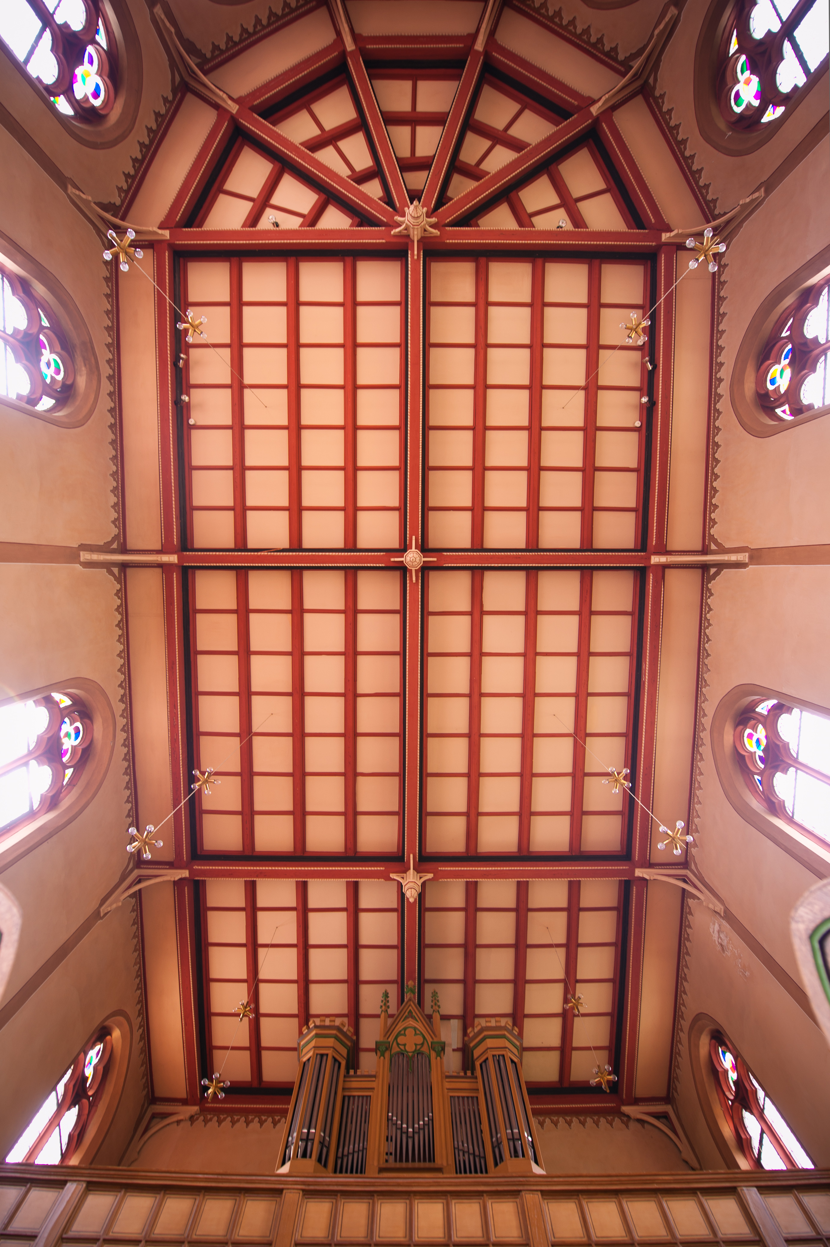 Evangelische Kirche Kinzenbach, Landkreis in Hessen, Deutschland